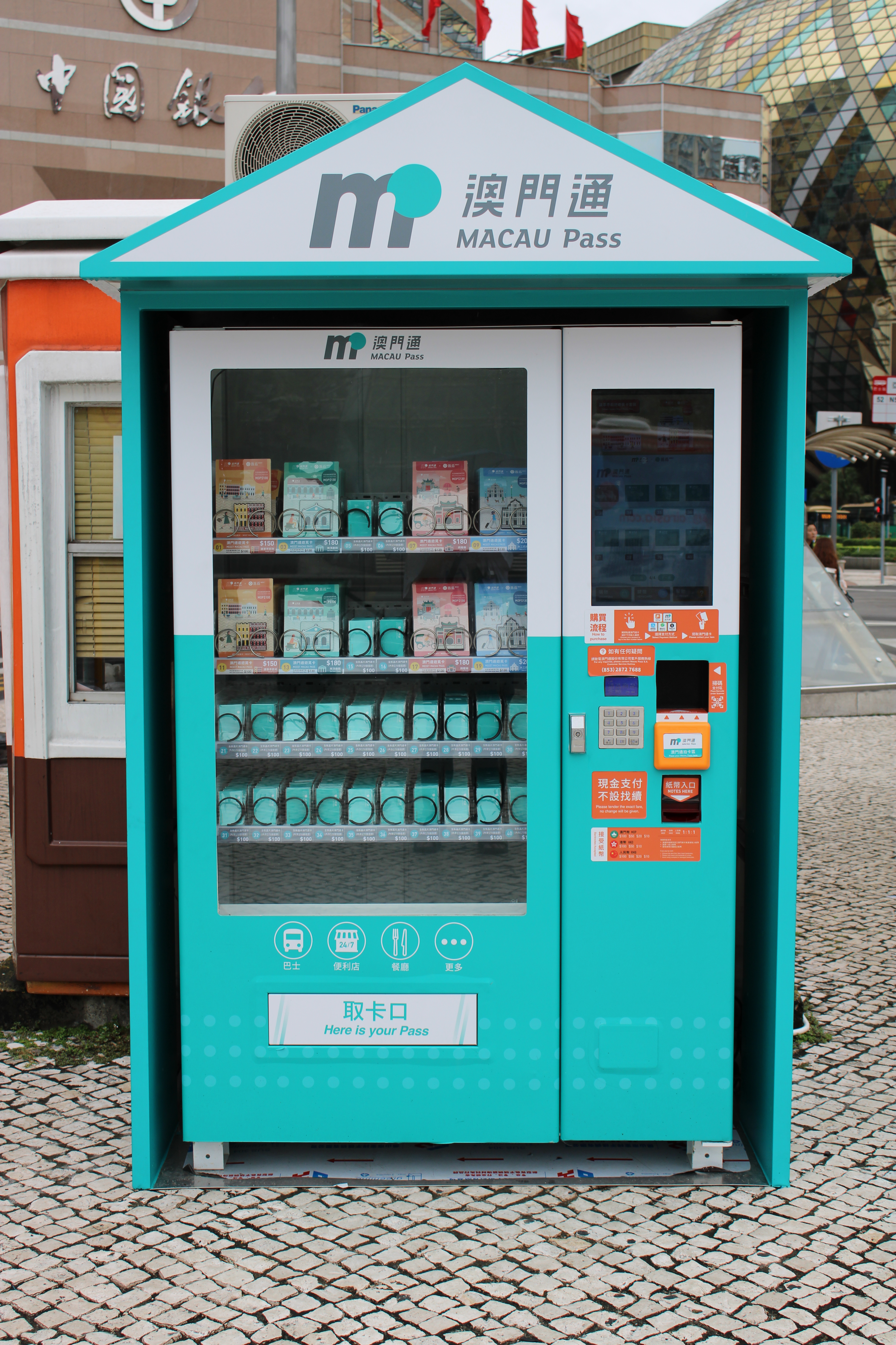 設置在亞馬喇前地的澳門通自動販賣機，支援多種支付方式購買澳門通卡。 中文（中国大陆）: 设置在亚马喇前地的澳门通自动售卖机，支持多种支付方式购买澳门通卡。